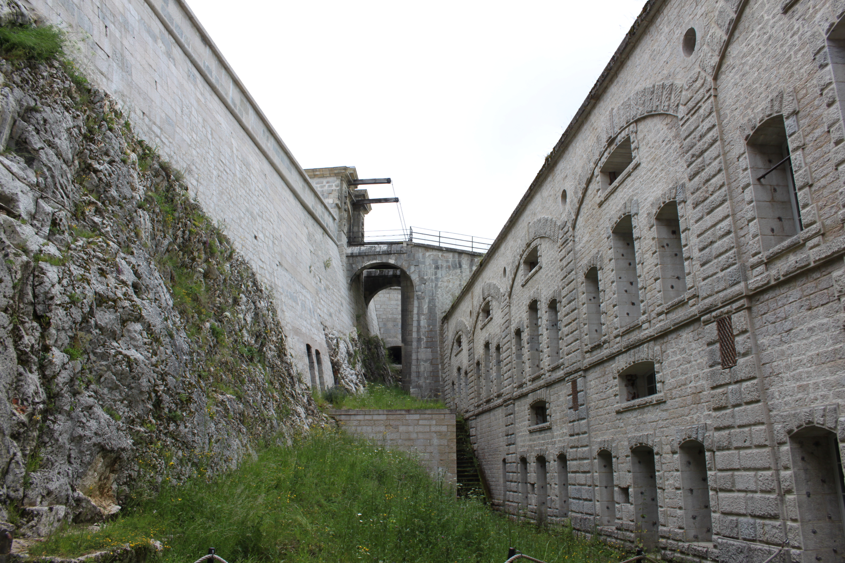 Fort de Joux, Doubs, Franche-Comté, France